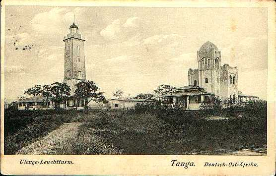 Kiswahili: Hiki ni kisiwa cha Ulenge ambacho kilikuwa na mnara wa kuongozea meli. picha kutoka maktaba ya URITHI Tanga.